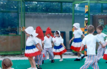 Kermesse de classe maternelle en France.